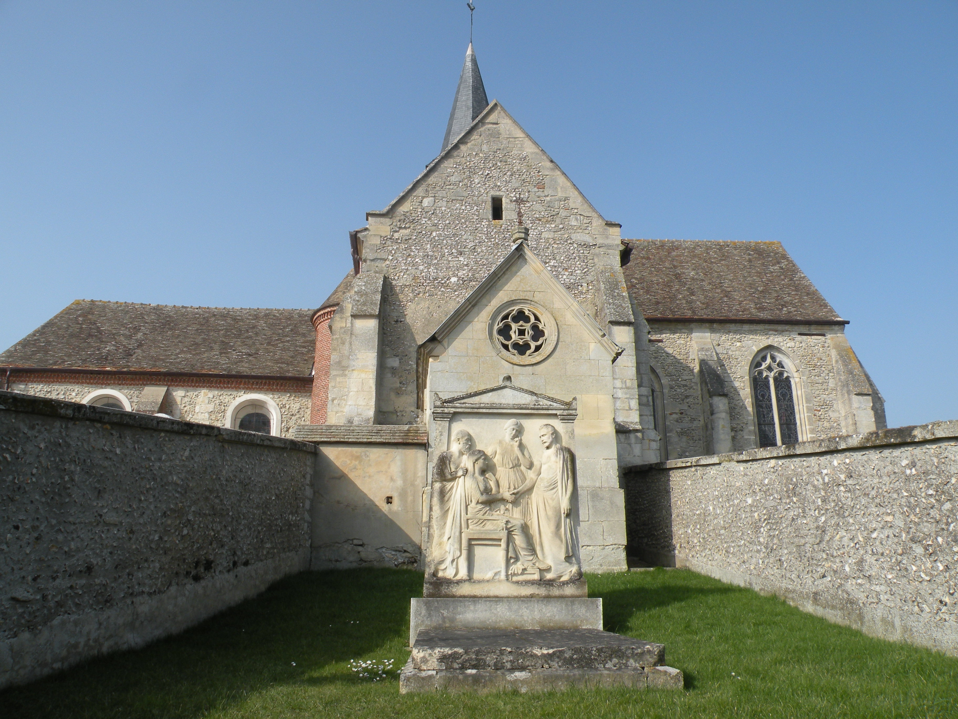 Église Saint Jean-Baptiste d'Énencourt-le-Sec Tombe de marie louise budin nee sasle 12 mai 1947